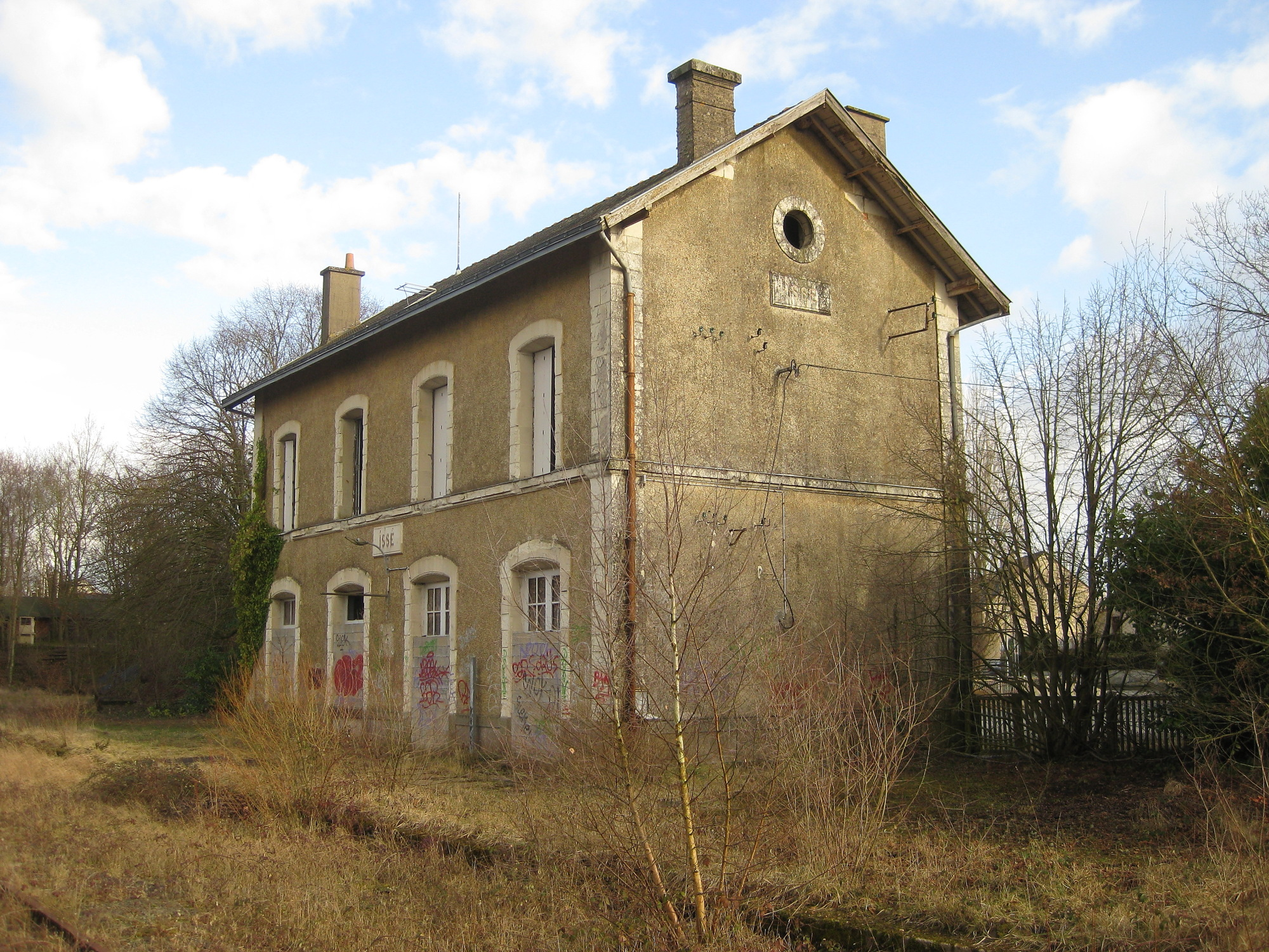 Le bâtiment-voyageurs de la gare d'Issé en 2009, vu côté voies : muré depuis la fermeture de la ligne dans les années 1980, il sera rasé quelques années plus tard.